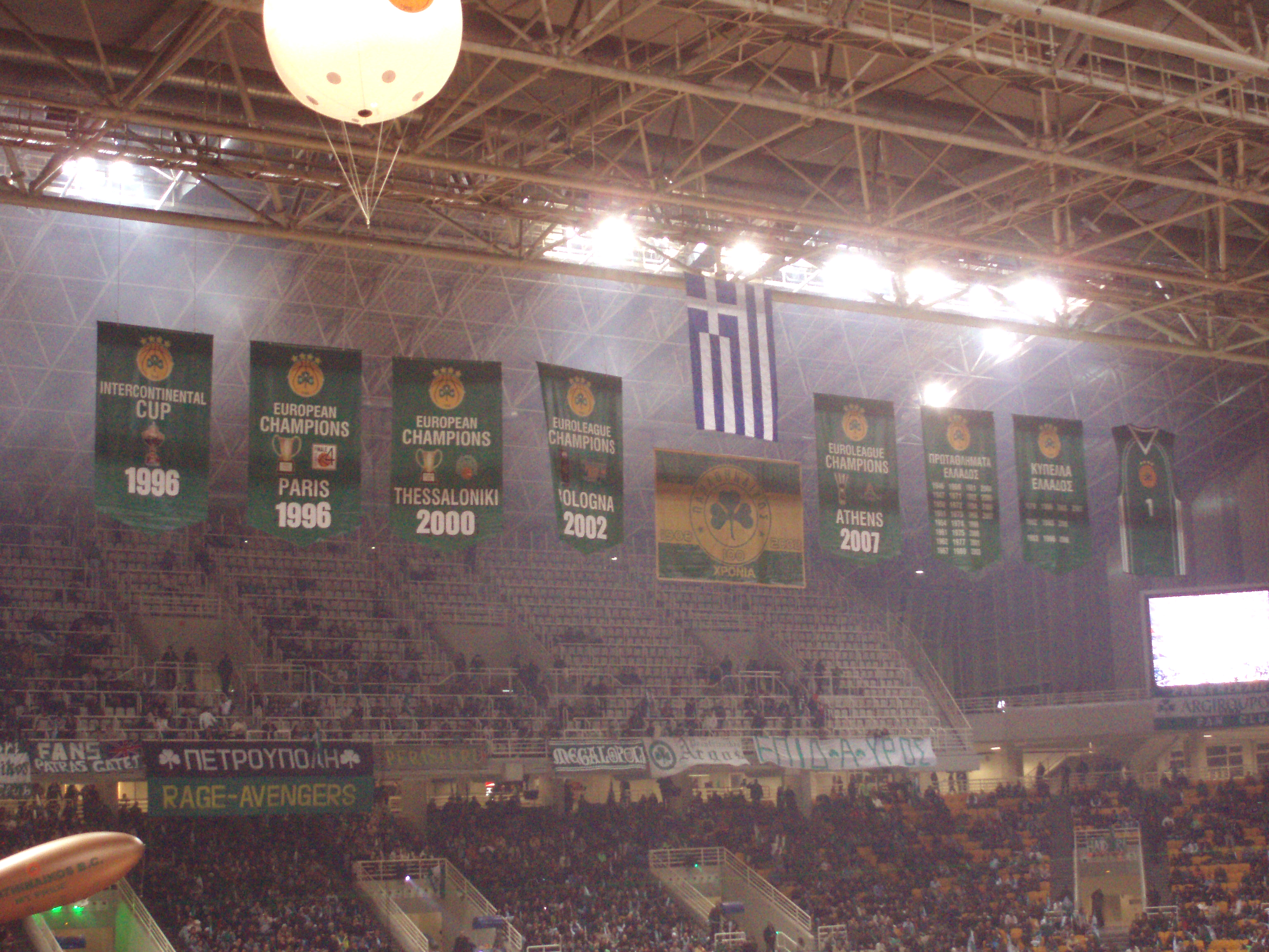 Panathinaikos flags